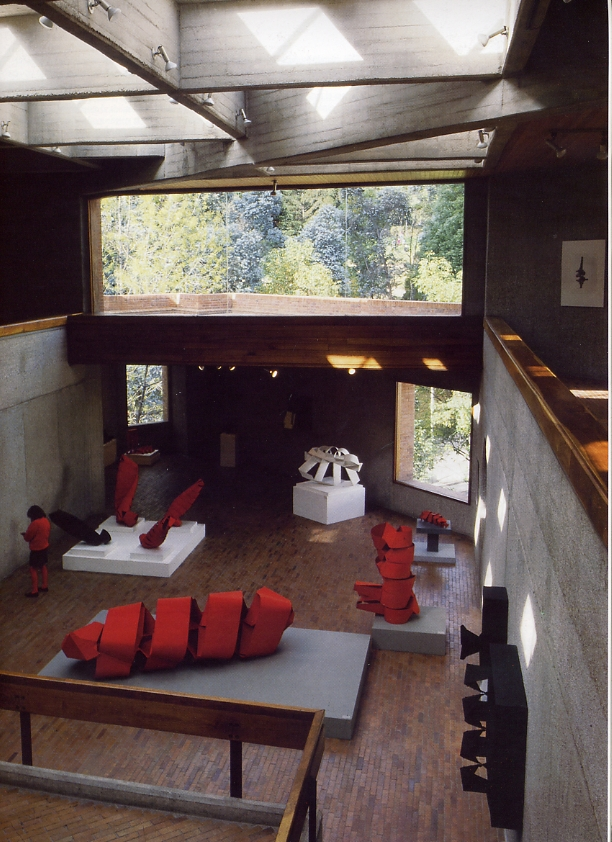 Imágen del Museo de Arte Moderno de Bogotá MAMBO